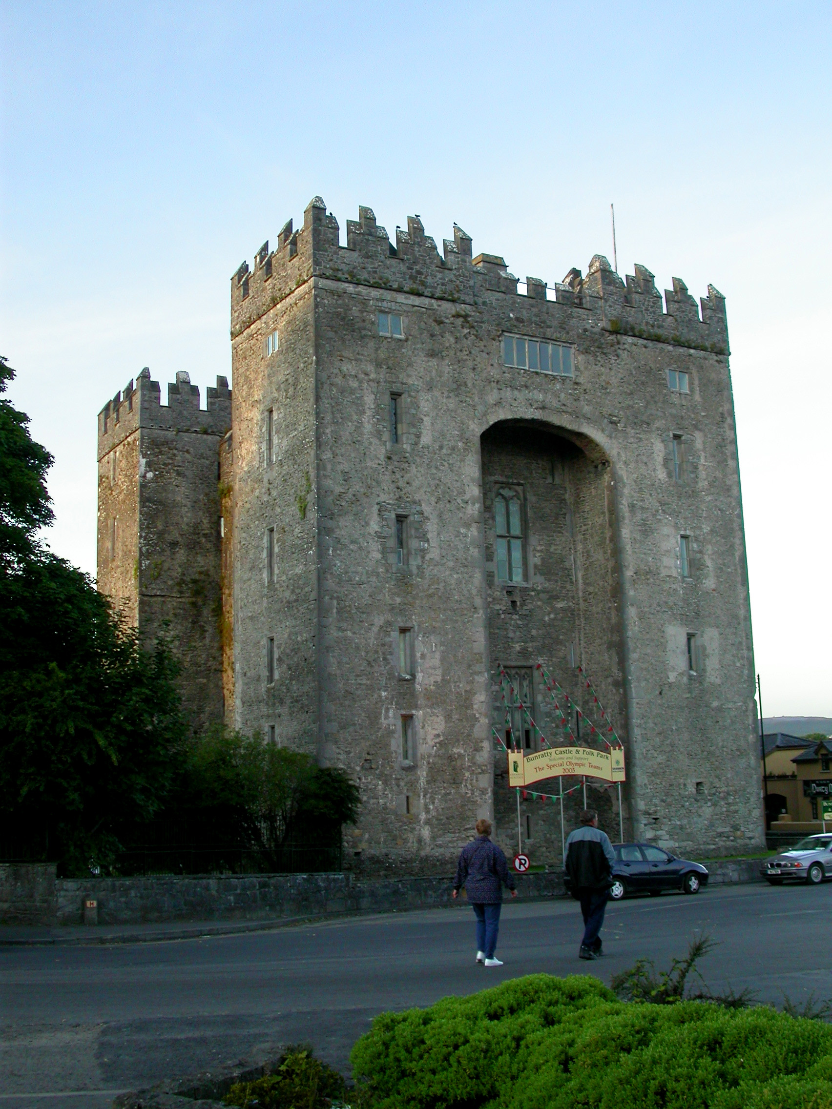 Caislean Bhun Raite